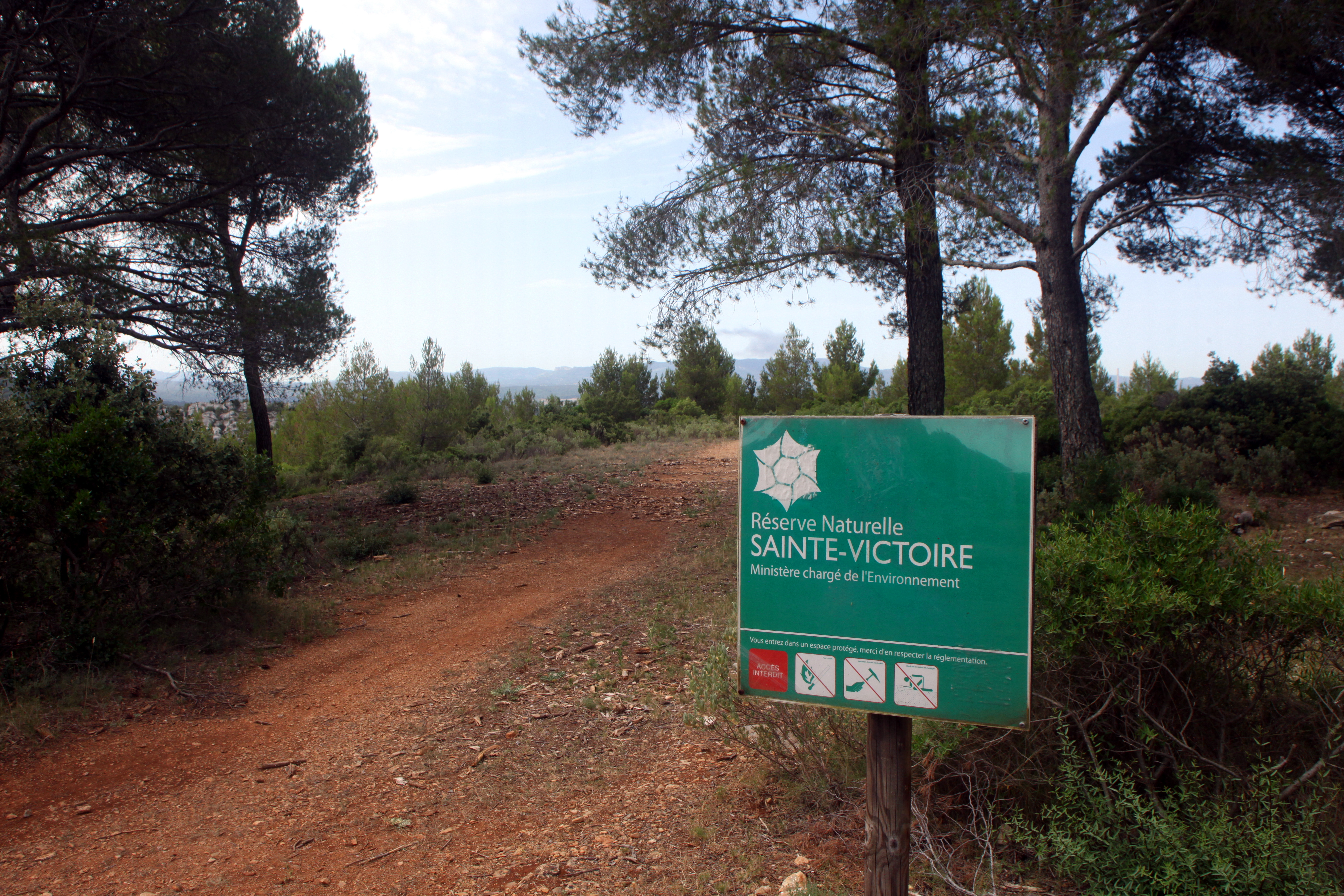 Balisage de la RNN de Sainte-Victoire.